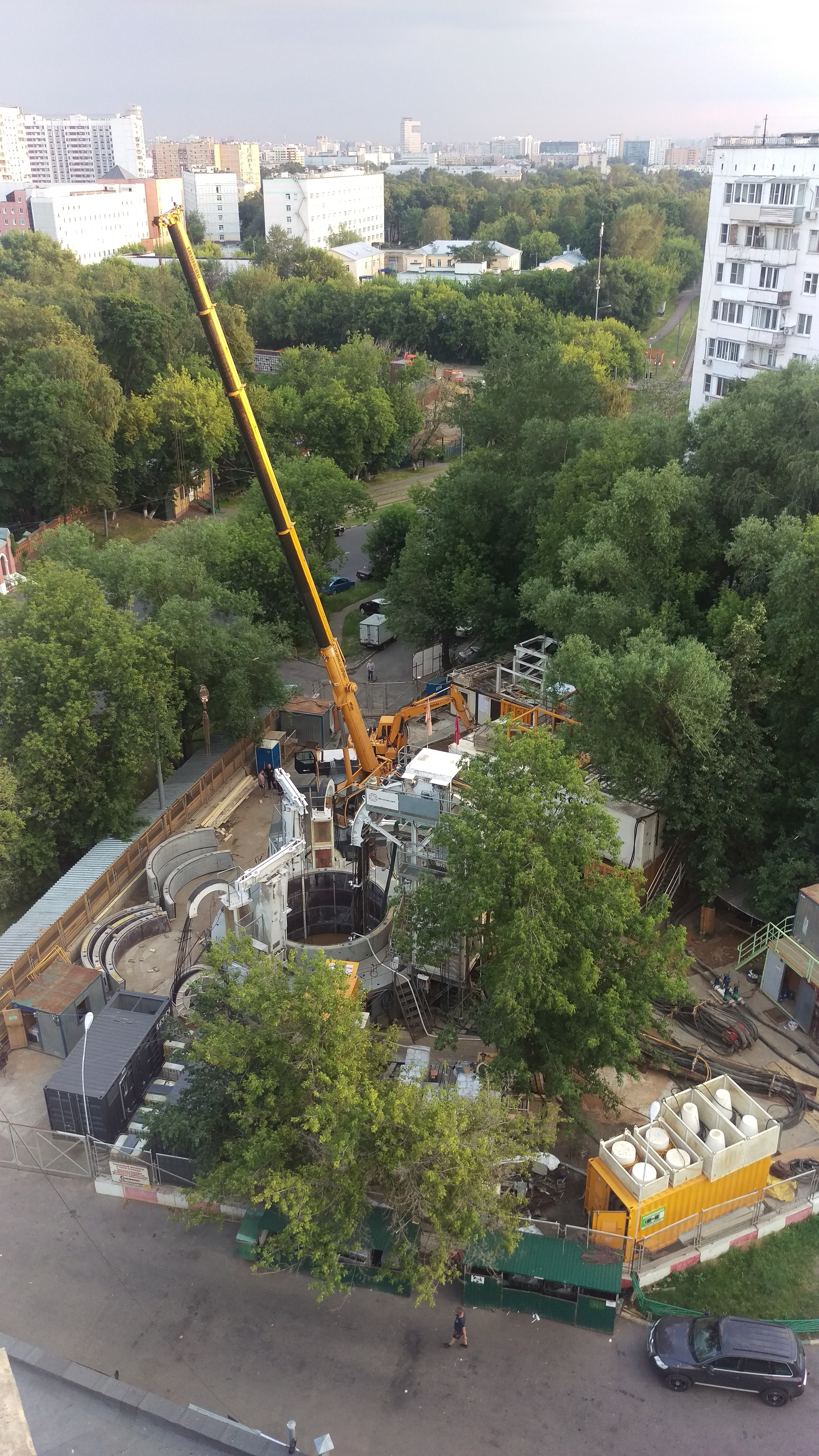 Строительство участка ТПК Рубцовская-Лефортово